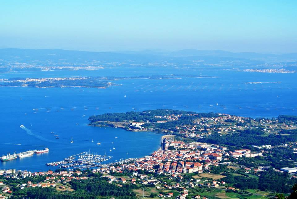 Na imaxe, vistas dende A Curota, mirador natural da Pobra do Caramiñal